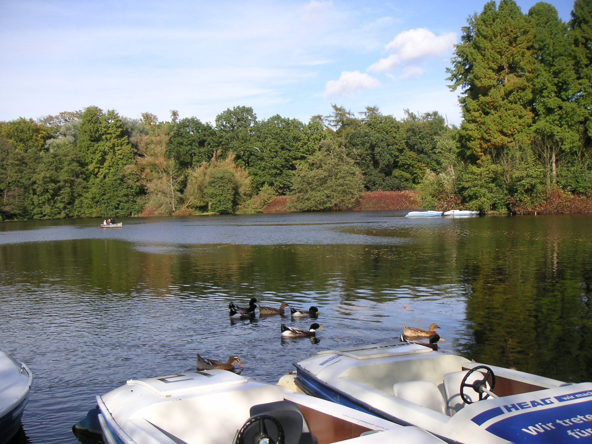 Tretboote auf dem Steinbrücker Teich in Darmstadt am Oberwaldhaus